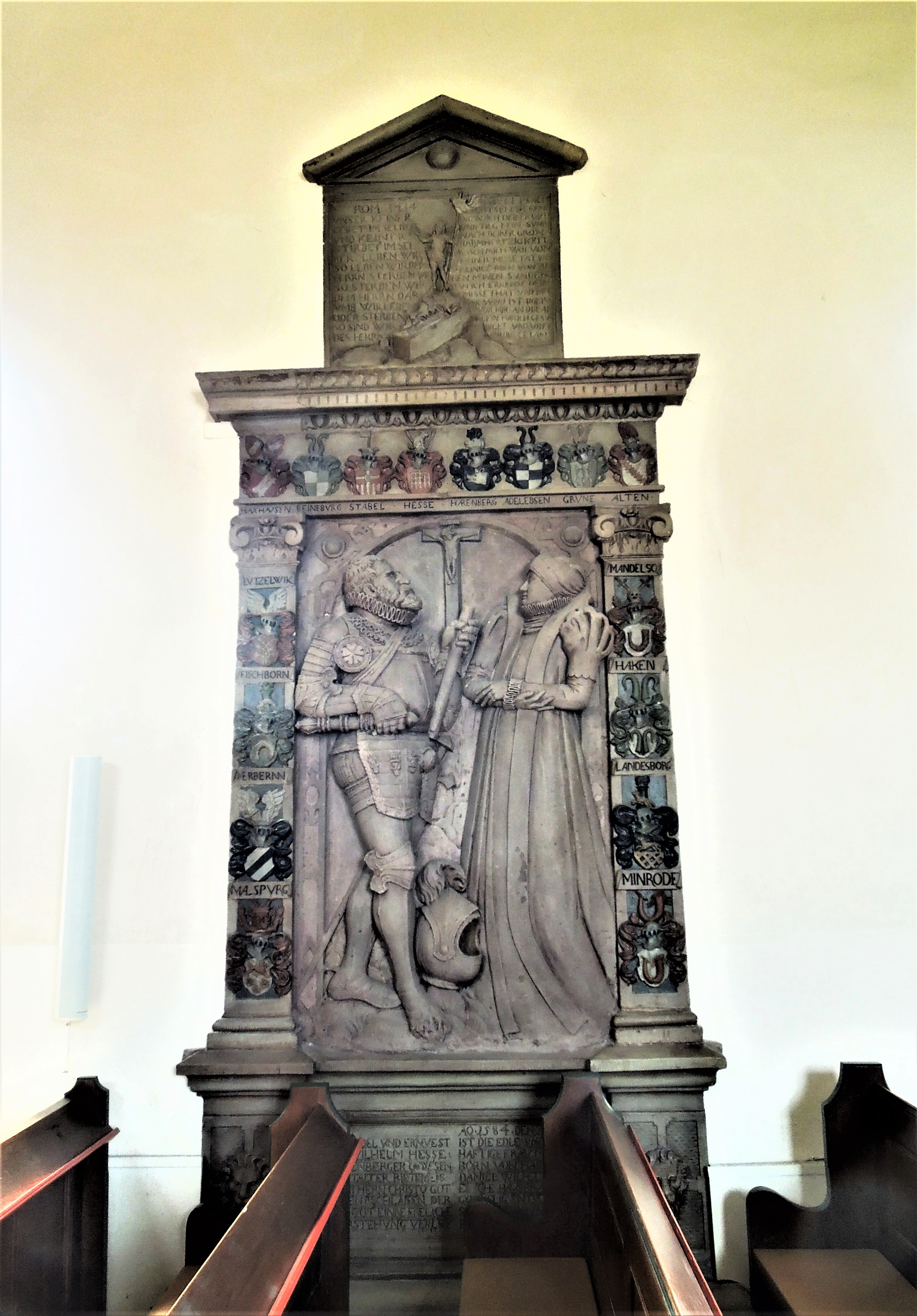 Wichdorf, Epitaph in der Kirche: Daniel Wilhelm Hess von Wichdorf und seine 1584 verstorbene Ehefrau Maria von Harenberg